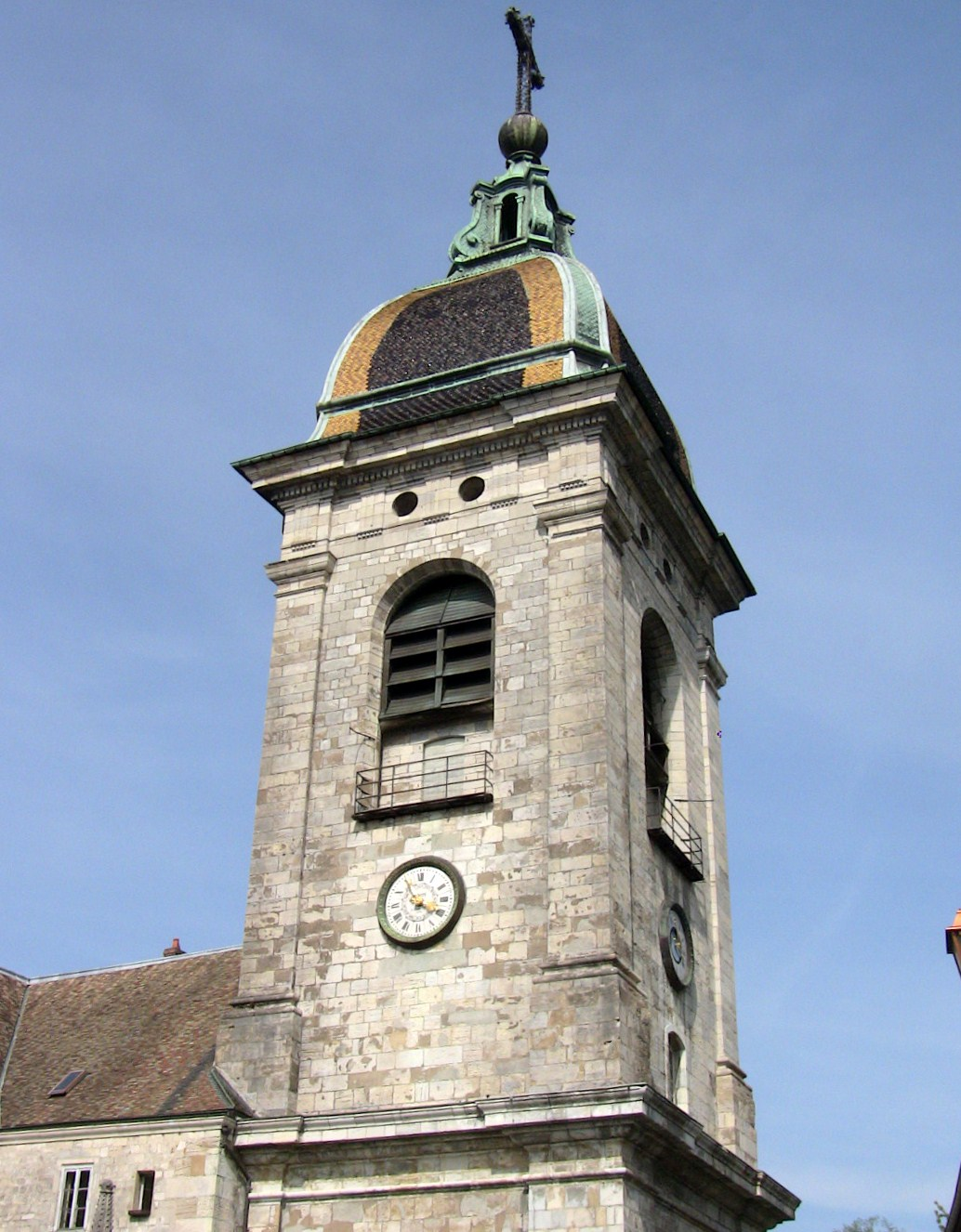 Le clocher de la cathédrale Saint-Jean de Besançon (Doubs, France).